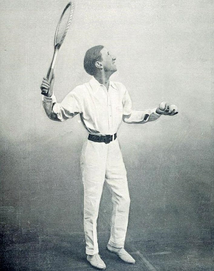 Maurice Germot, champion de France de tennis en juin 1905.